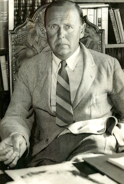 portrett, mann, litteraturhistoriker, idéhistoriker, professor, sittende halvfigur ved skrivebord.